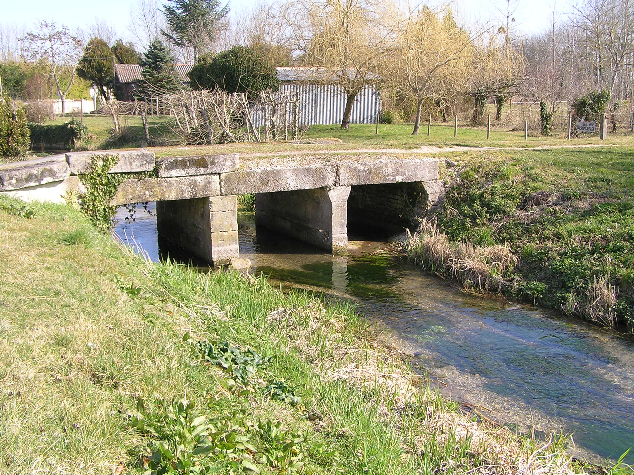 Bras de l'Antenne dans Prignac